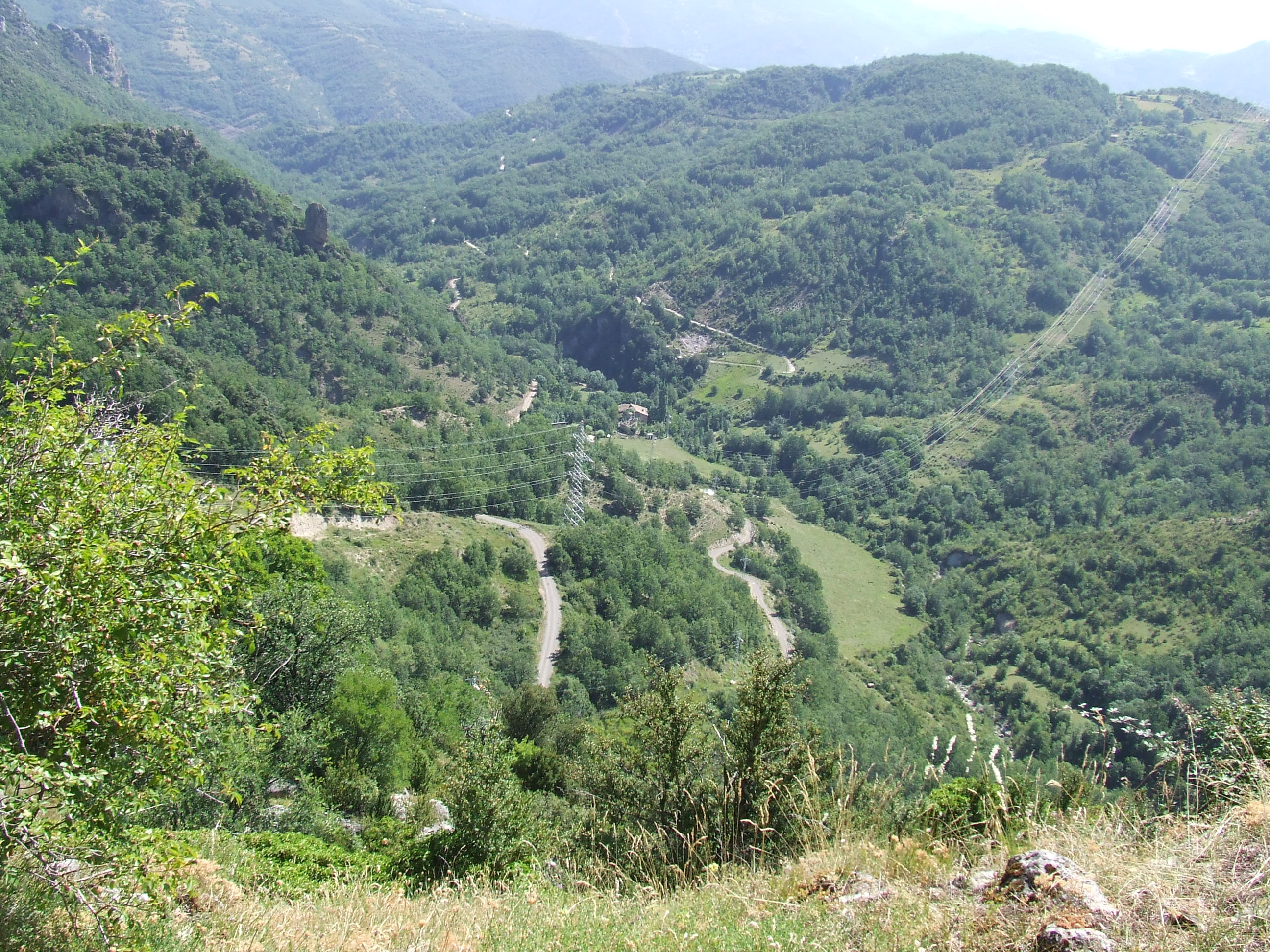 Riu de Cadolla (Senterada, Pallars Jussà)